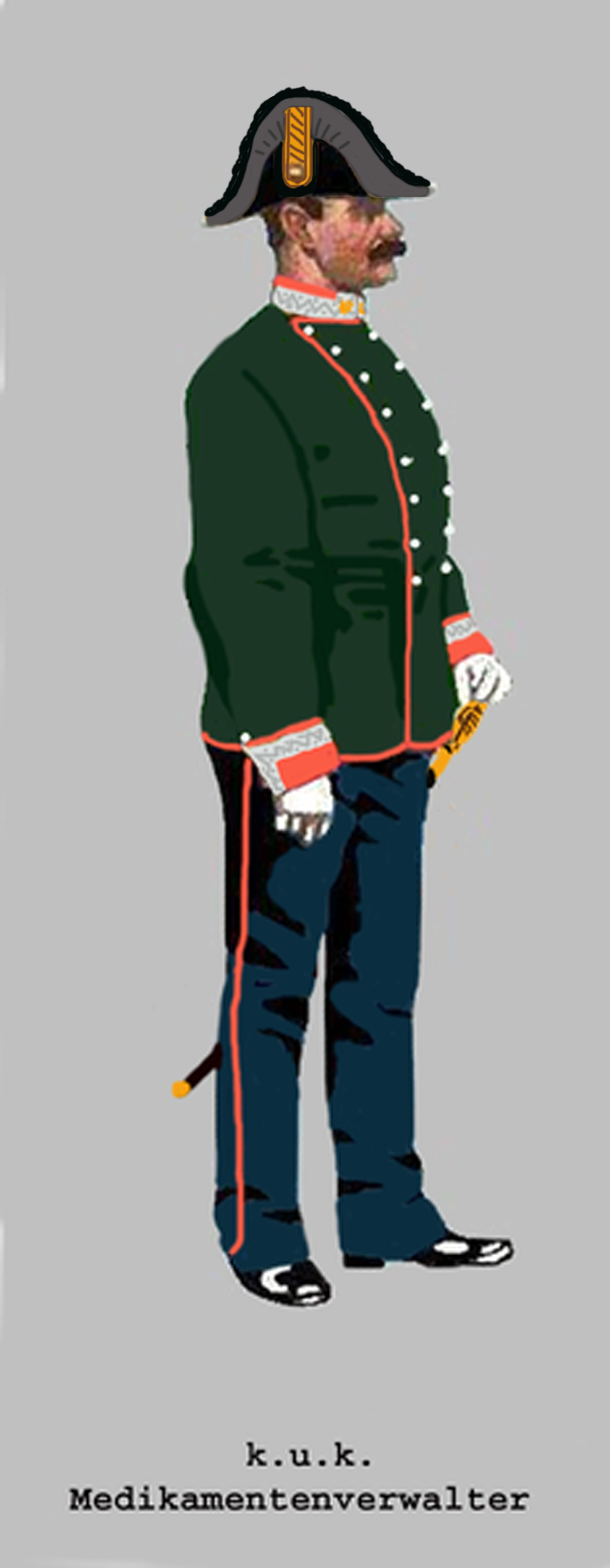 k.u.k. Medikamentenverwalter in Parade (Egalisierung Silber/Krapprot) - Nach einem Gemälde im Heeresgeschichtlichen Museum in Wien. Details und Farben sind der k.u.k. Adjustierungsvorschrift (Ausgabe 1912) entnommen.